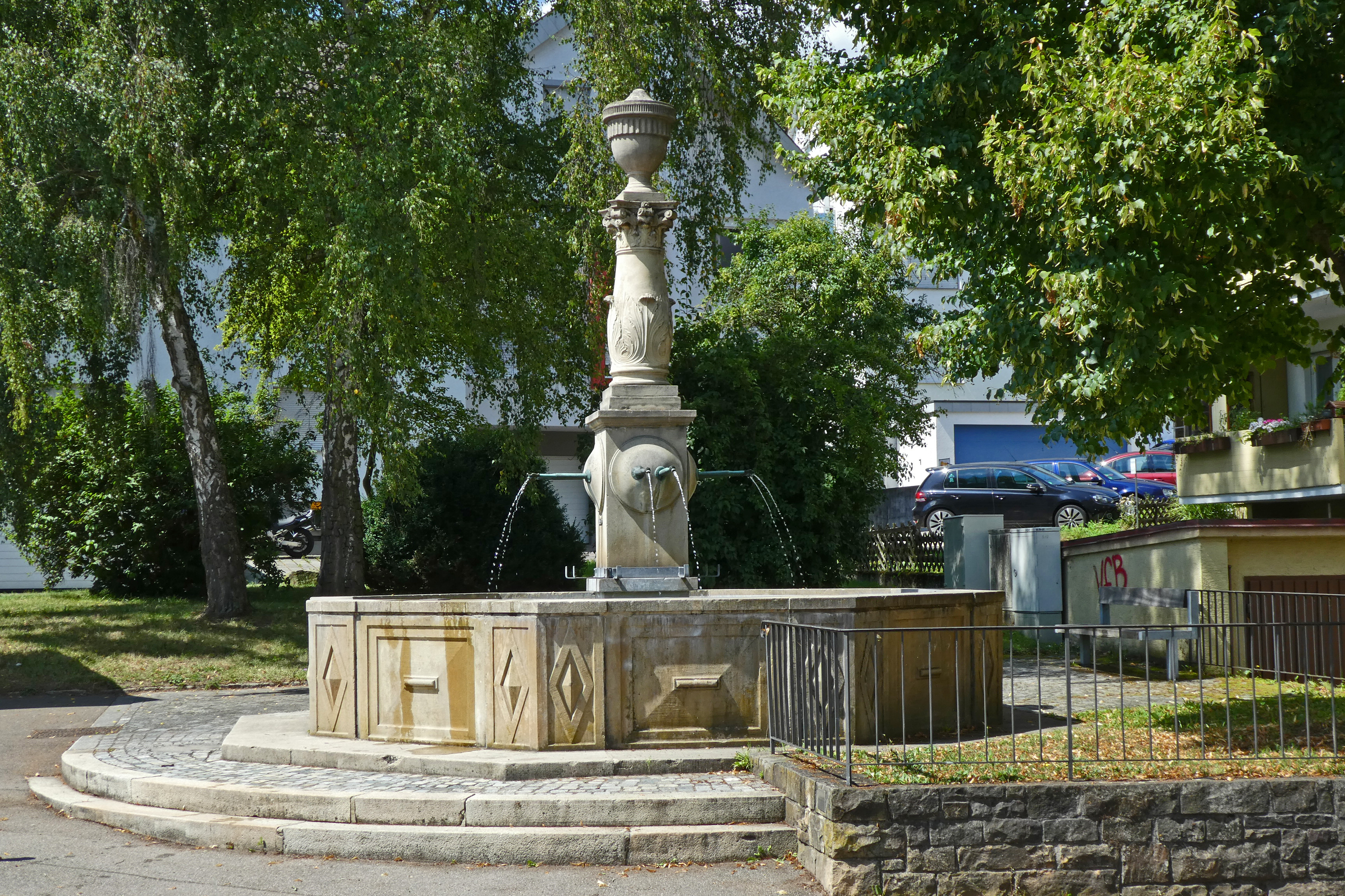 Der Achtröhrenbrunnen mit Brunnensäule in ES-Wäldenbronn an der Stettener Straße